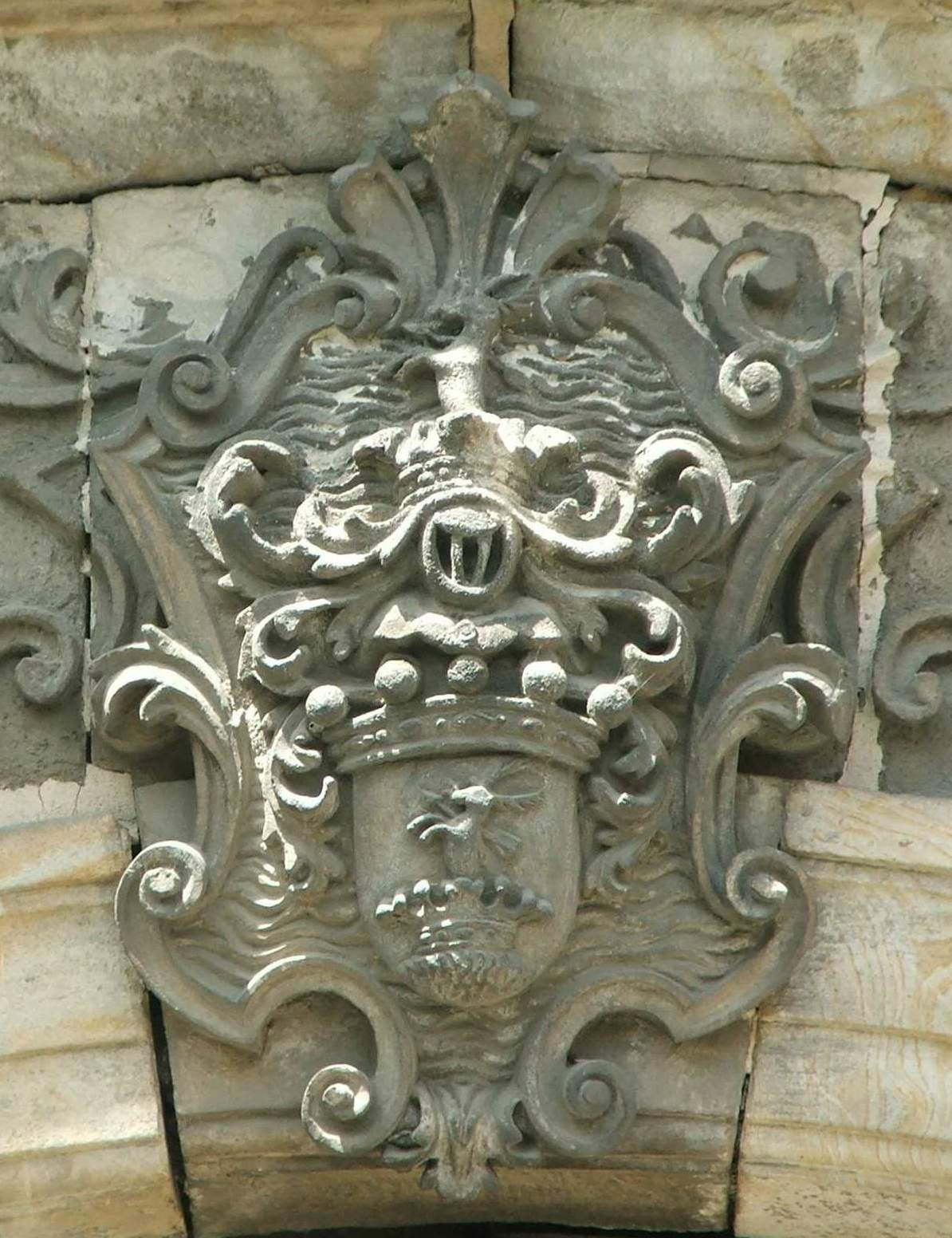 Címer a Sándor-palota homlokzatán, Esztergom